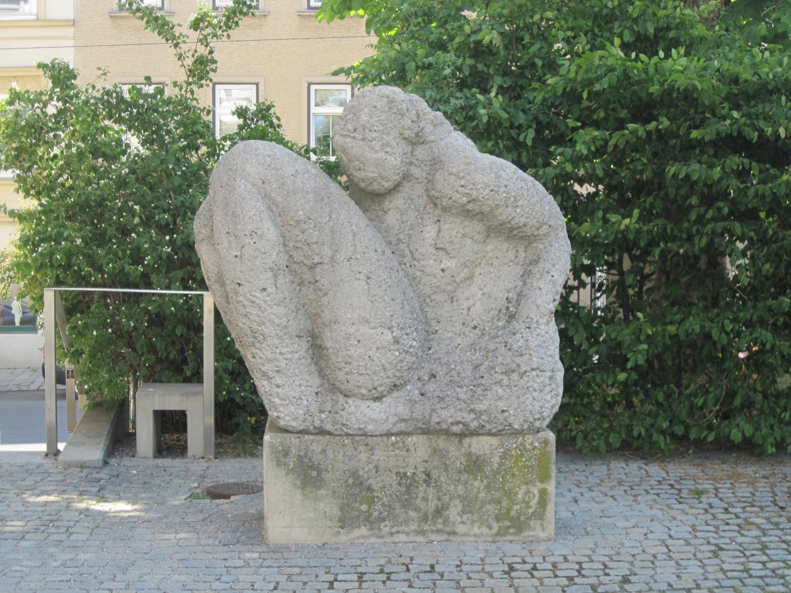 Skulptur von Ulrike Truger: Aufbrechende / Sich Erhebende I, 1979, Lindabrunner Konglomerat, Kunstmeile Ottakring, Thaliastraße 125a, Wien-Ottakring.